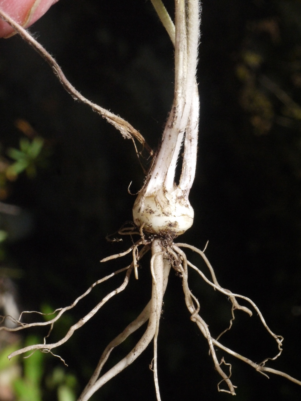 caulobulbe de Ranunculus bulbosus